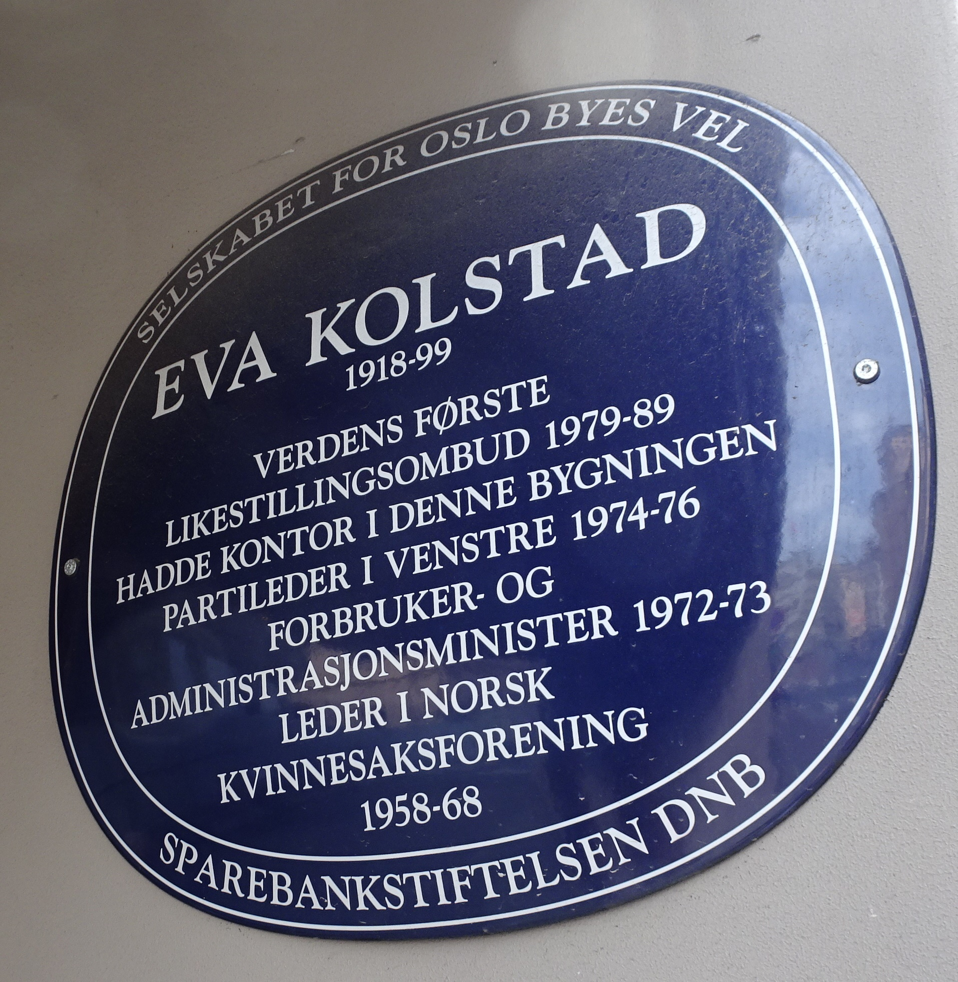 Blå minneplakett for Eva Kolstad ved Venstres hus. Merk at skiltet har feil årstall; Kolstad ledet Norsk Kvinnesaksforening 1956–1968.